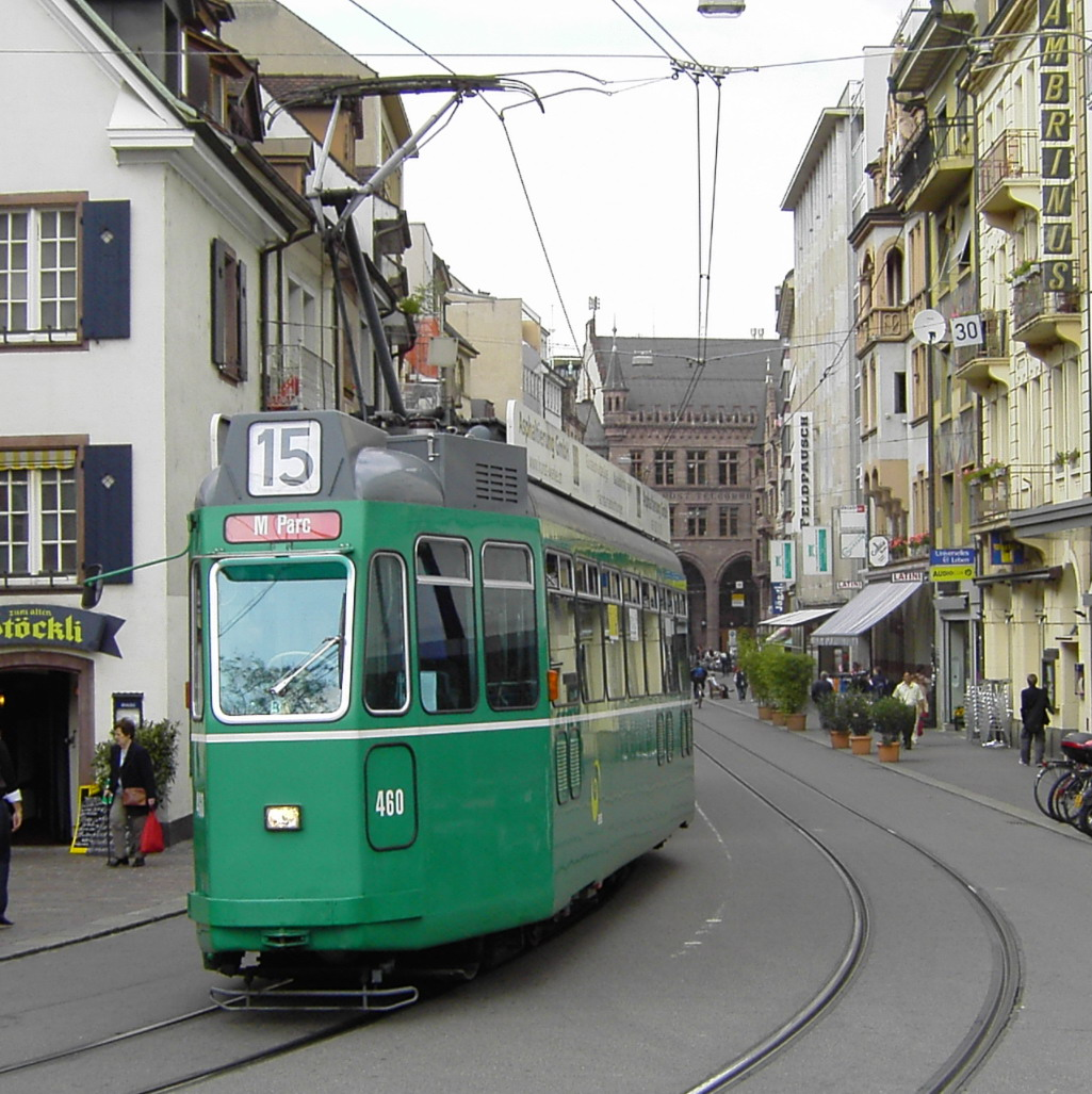 Beschreibung: Straßenbahn der Basler Verkehrs-Betriebe Quelle: selbst aufgenommen Fotograf: CrazyD, 16. Aufgust 2005 Lizenzstatus: GNU FDL Description: tram of the Basler Verkehrs-Betriebe Source: photo was taken by my self Photographer: CrazyD, 16 August 2005 Licence: GNU FDL